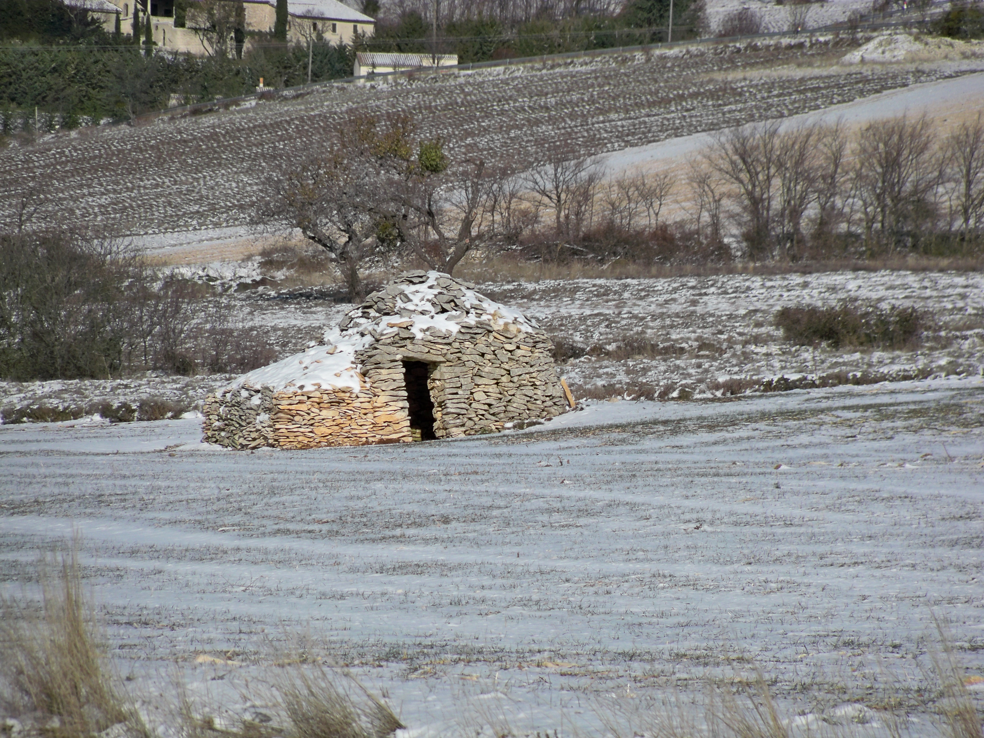 borie au plateau d'Albion